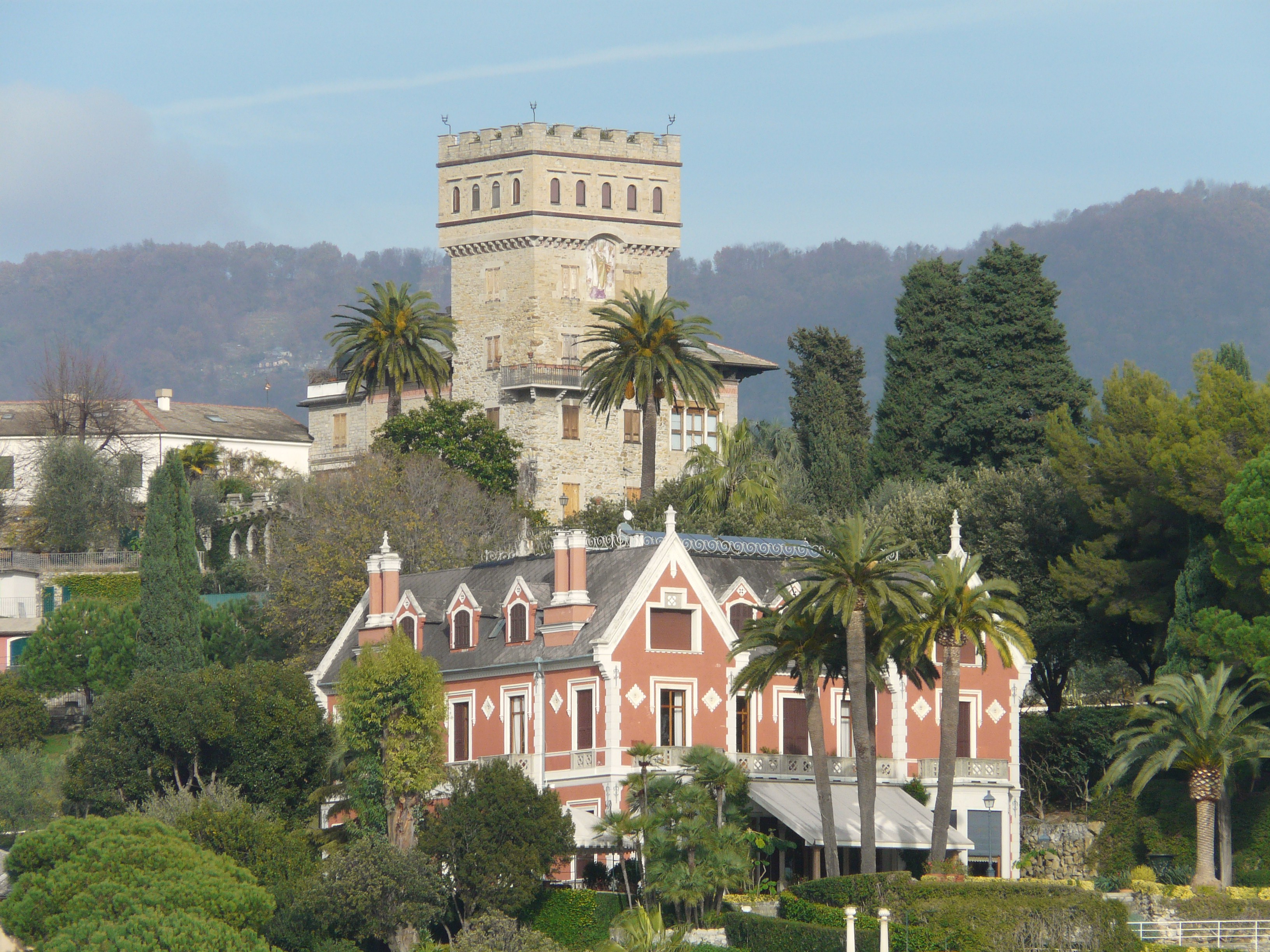 La villa del Trattato vista dal versante di Santa Margherita Ligure, Liguria, Italia